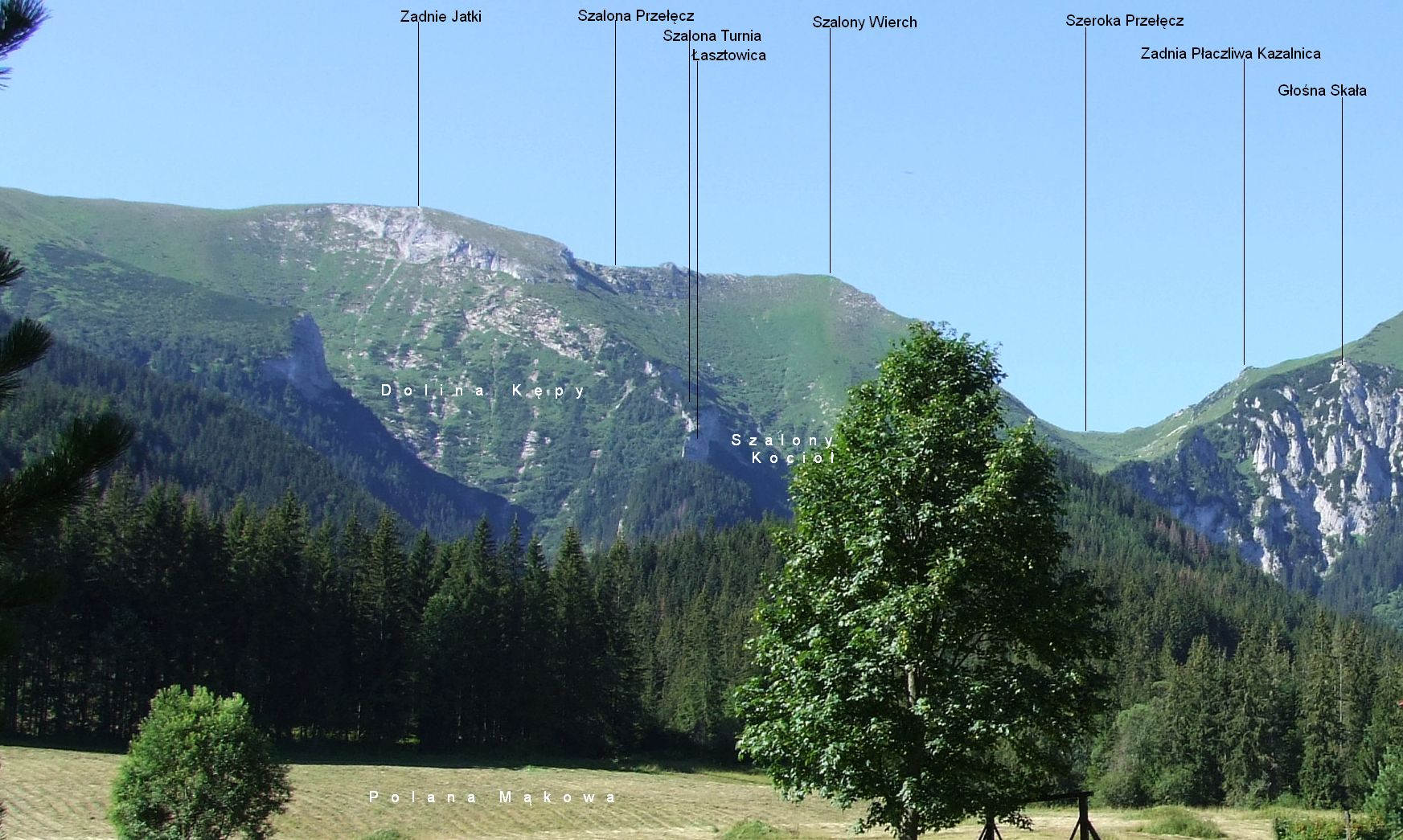 Widok z Mąkowej Polany na Tatry Bielskie